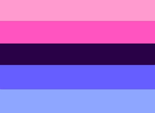 Flag of the sexual orientation omnisexuality (public domain)